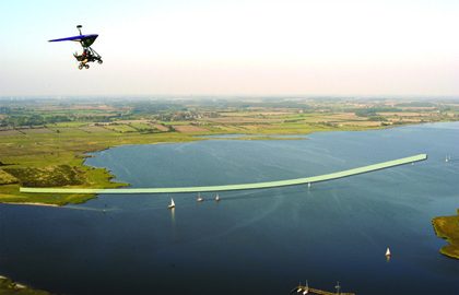 Luftaufnahme Schlei-Seesperrwerk von Süden